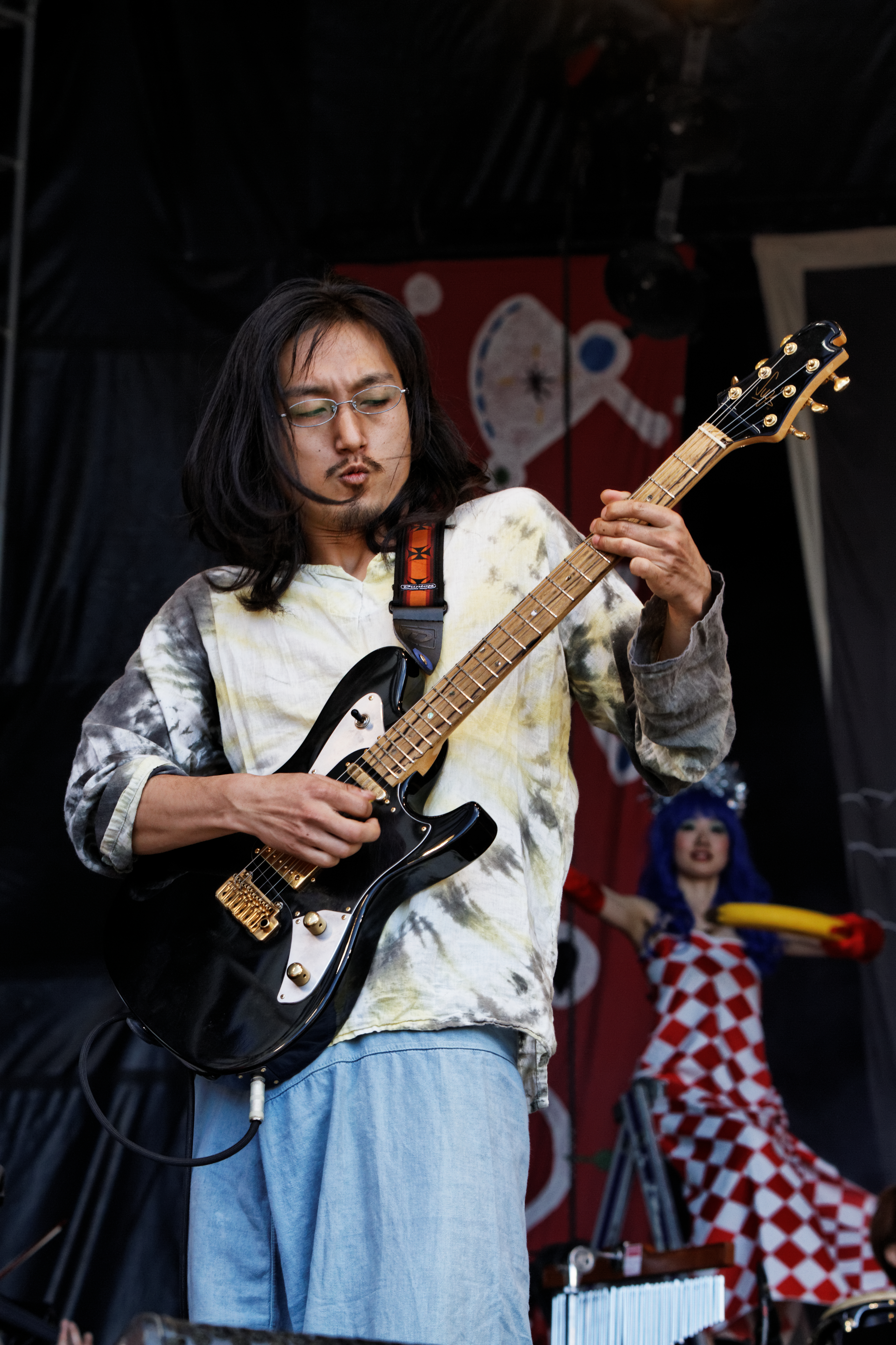 Le Shibusa Shirazu Orchestra en concert sur la scène Landaoudec lors du festival du bout du Monde à Crozon dans le Finistère (France).